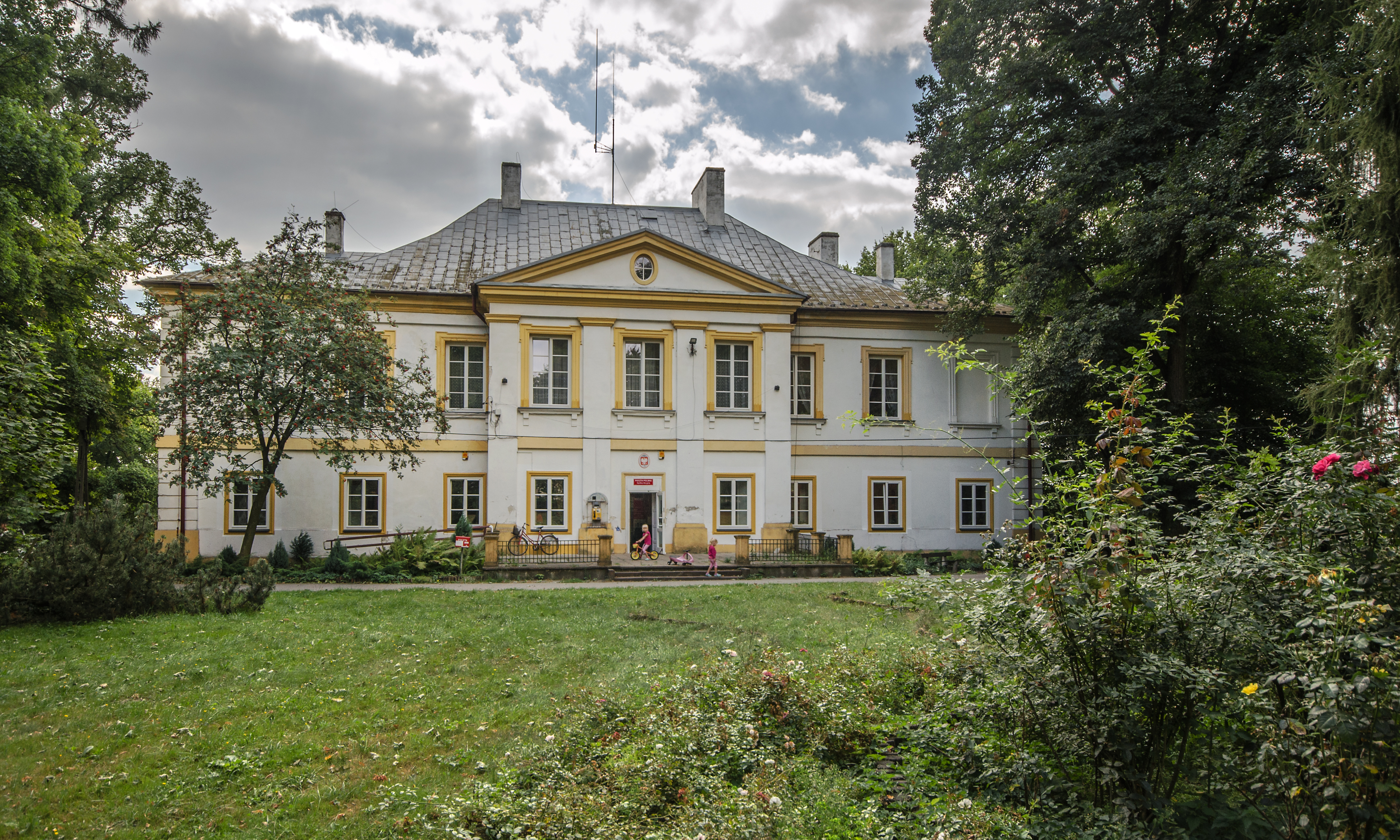 Słupia, pałac, pocz. XIX w.